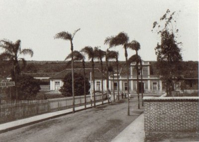 Estação de Mogi-Mirim, c. 1910. Foto do álbum da Mogiana